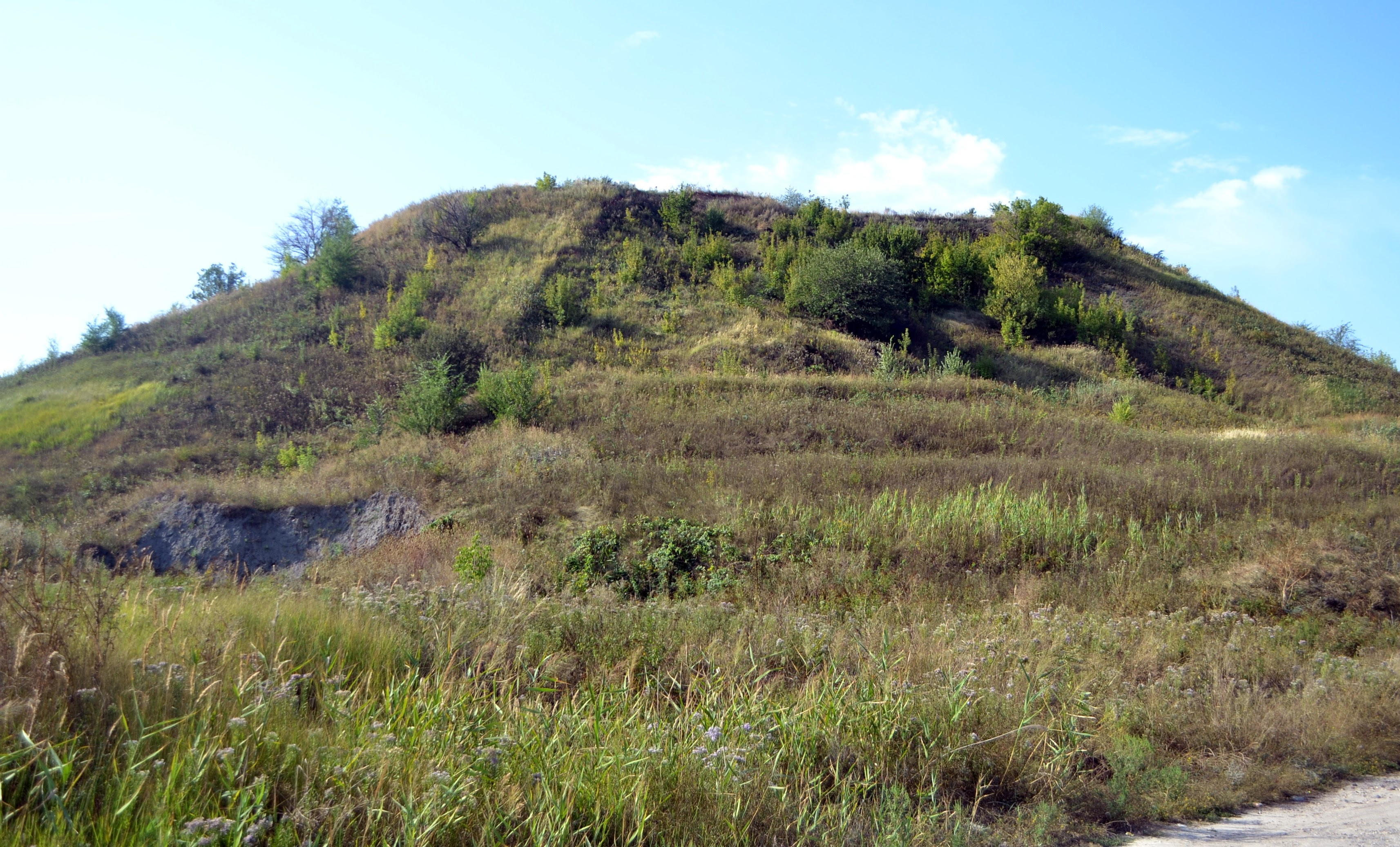 терикон шахти Крупської (Аненська) Лисичанськ Луганщина